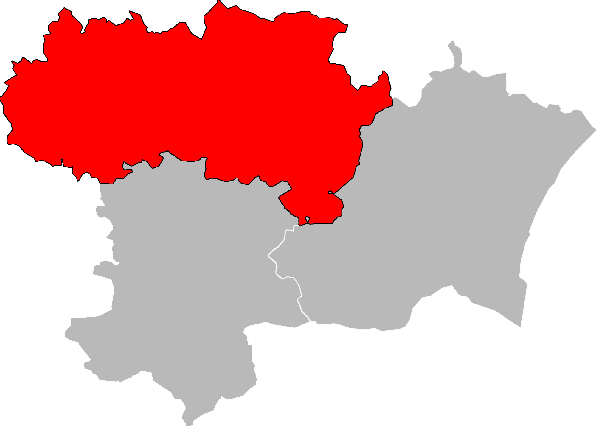 Arrondissement de Carcassonne Aude 2017